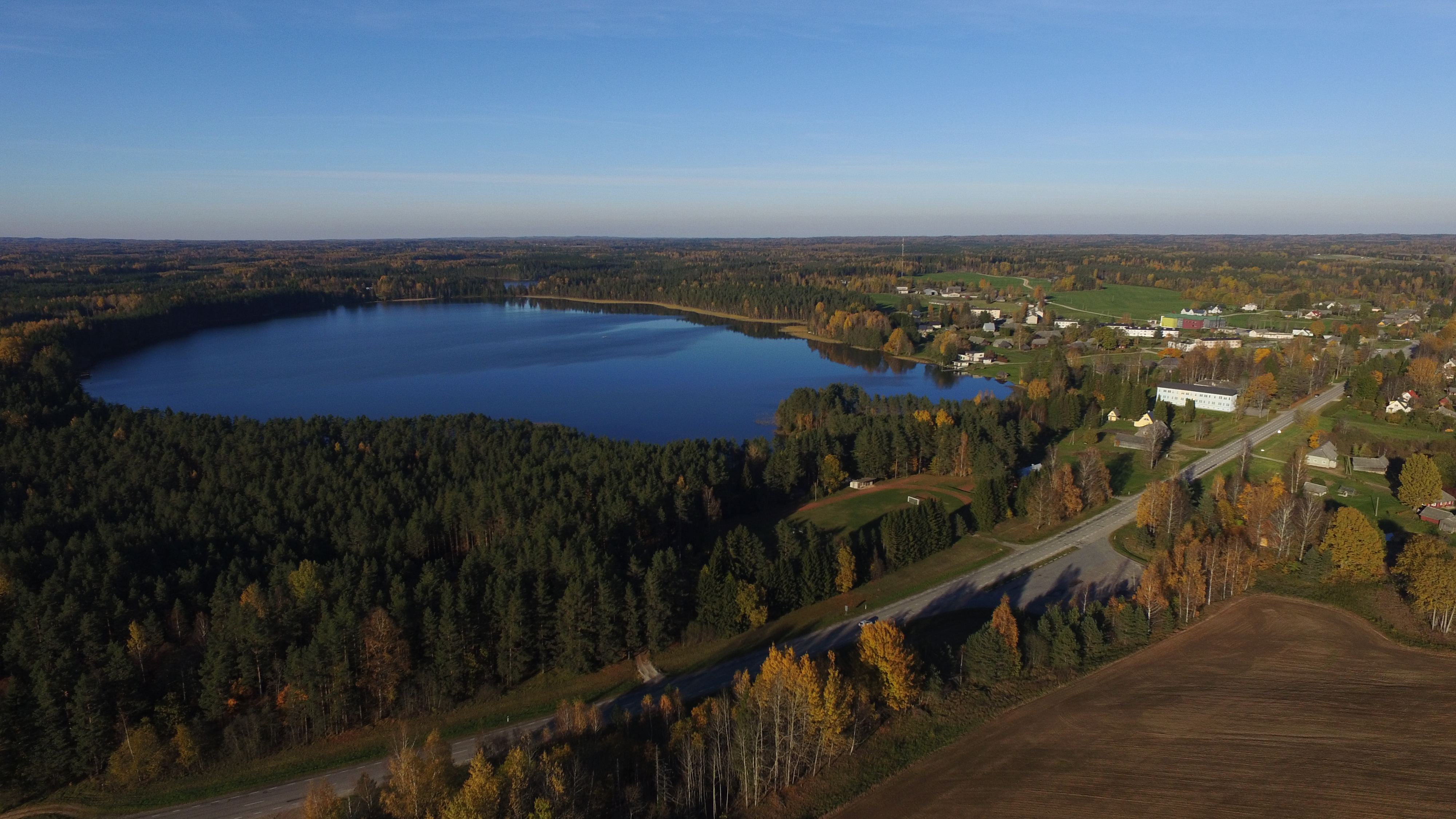 Misso alevik ja Pullijärv